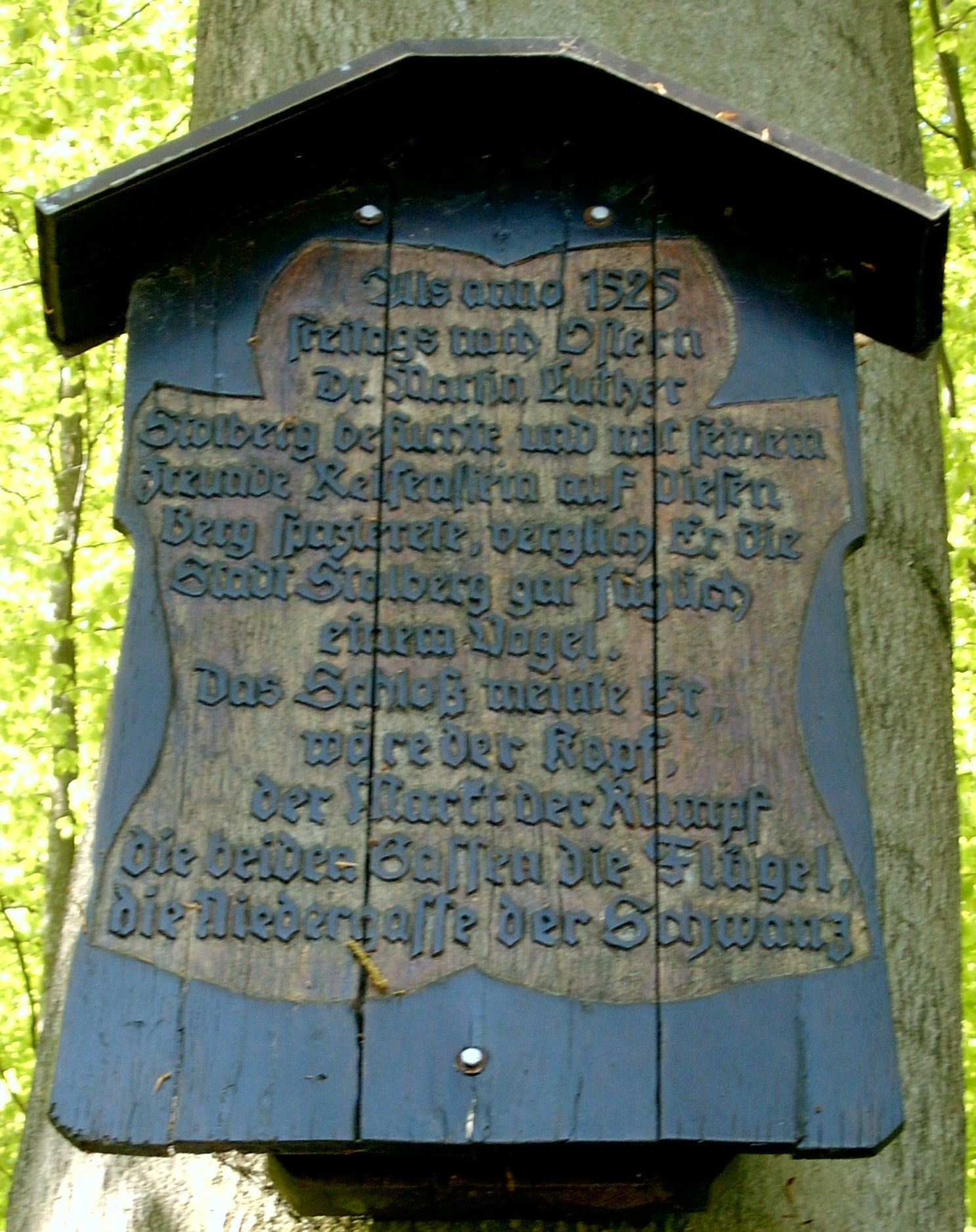 Tafel am Aussichtspunkt Lutherbuche in Stolberg (Harz).